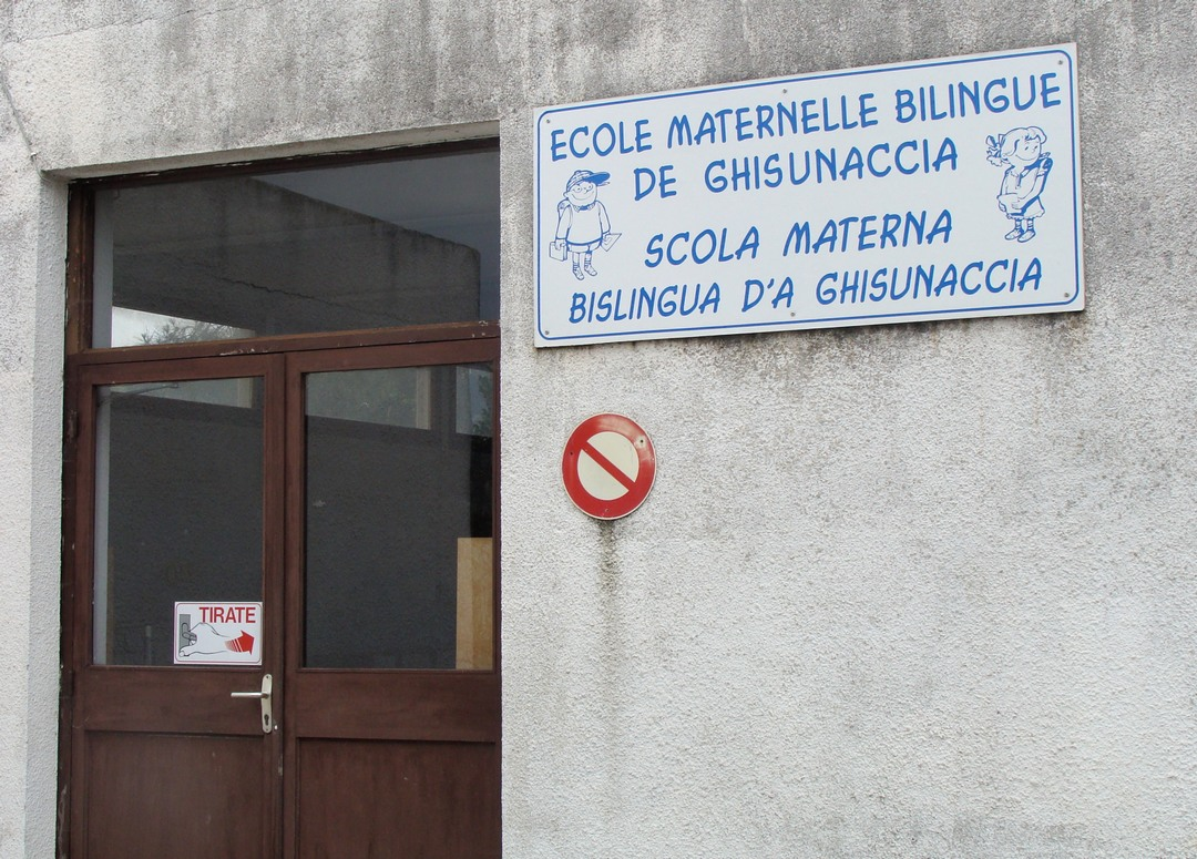 L'entrée de l'école bilingue de Ghisonaccia, proche du groupe scolaire.